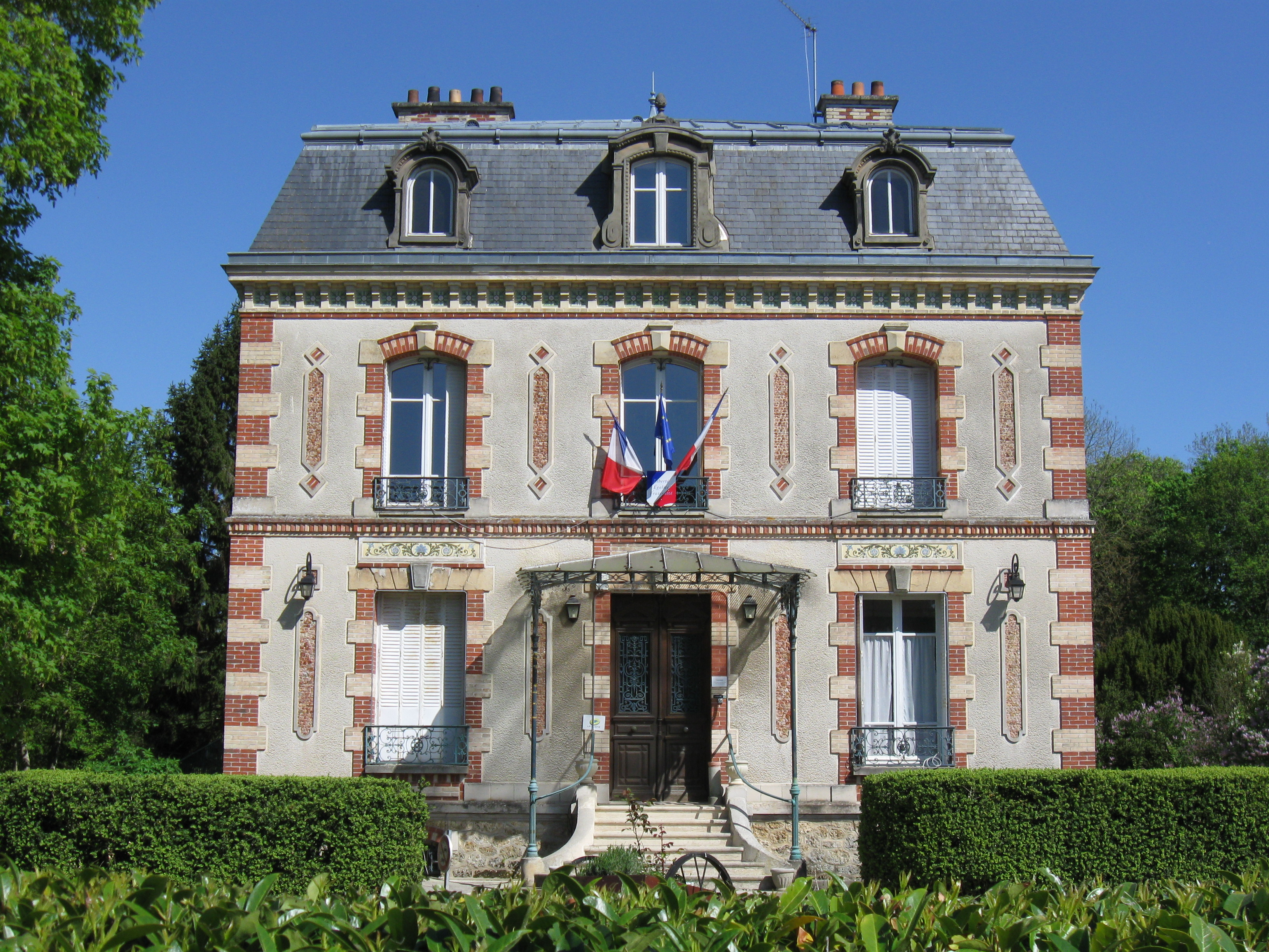 Mairie de Fontenailles. (Seine-et-Marne, région Île-de-France).